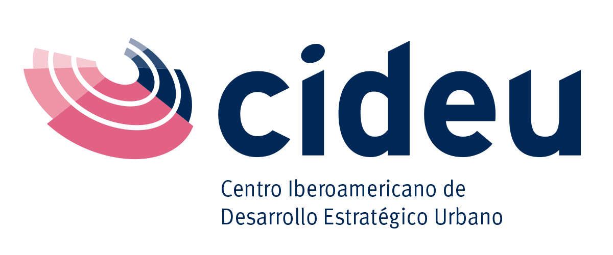 Logo CIDEU 2020